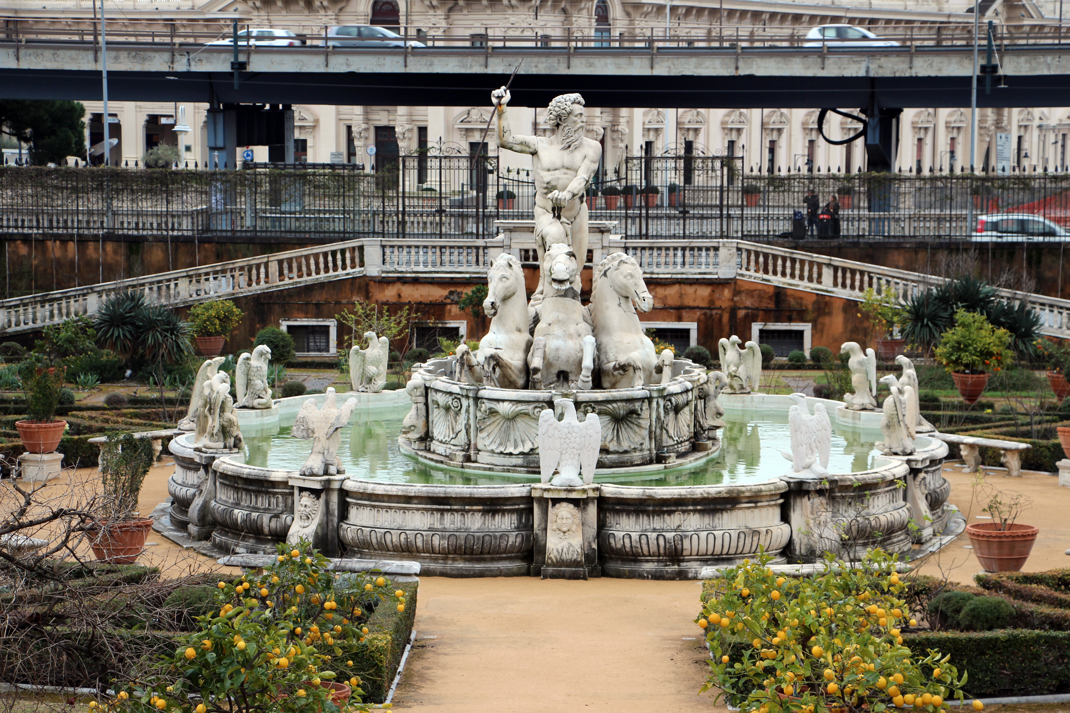 Villa del Principe, Genova